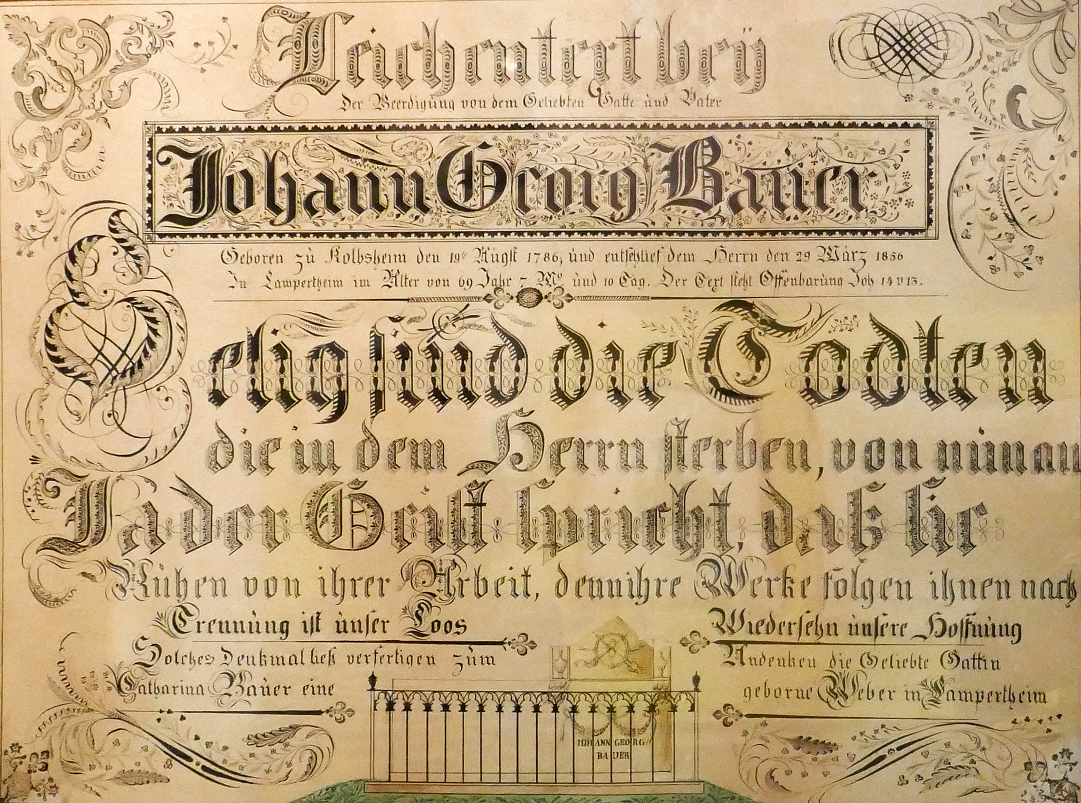 Souvenir mortuaire calligraphié offert par sa veuve pour Jean Georges Bauer, né à Kolbsheim le 19 août 1789, décédé le 29 mars 1856 à Lampertheim Exposition Vies protestantes : le mot et l'image au Musée alsacien de Strasbourg (2017)